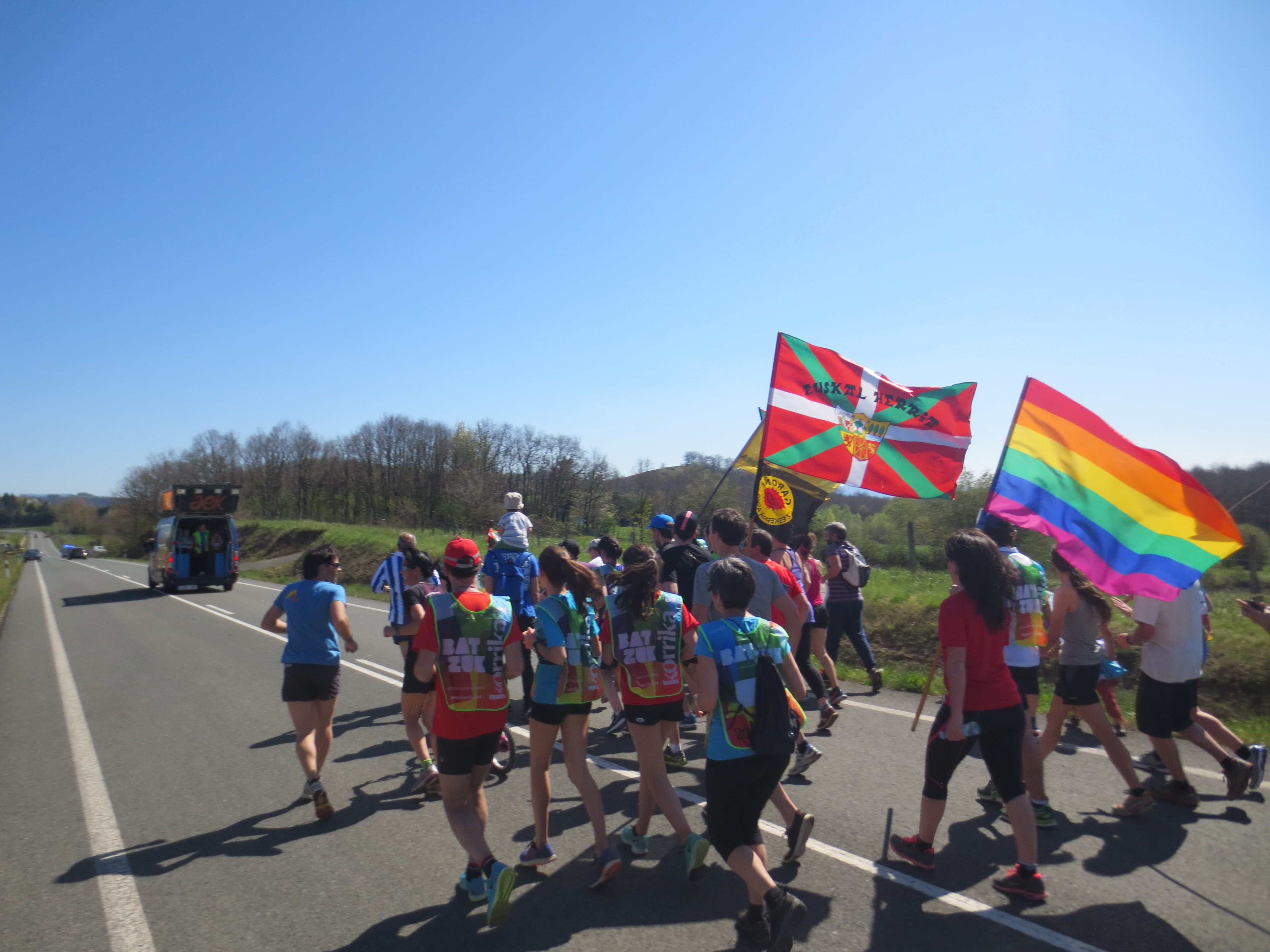 20. Korrika. 2017. Parte hartzaile batzuk 2.326. km.